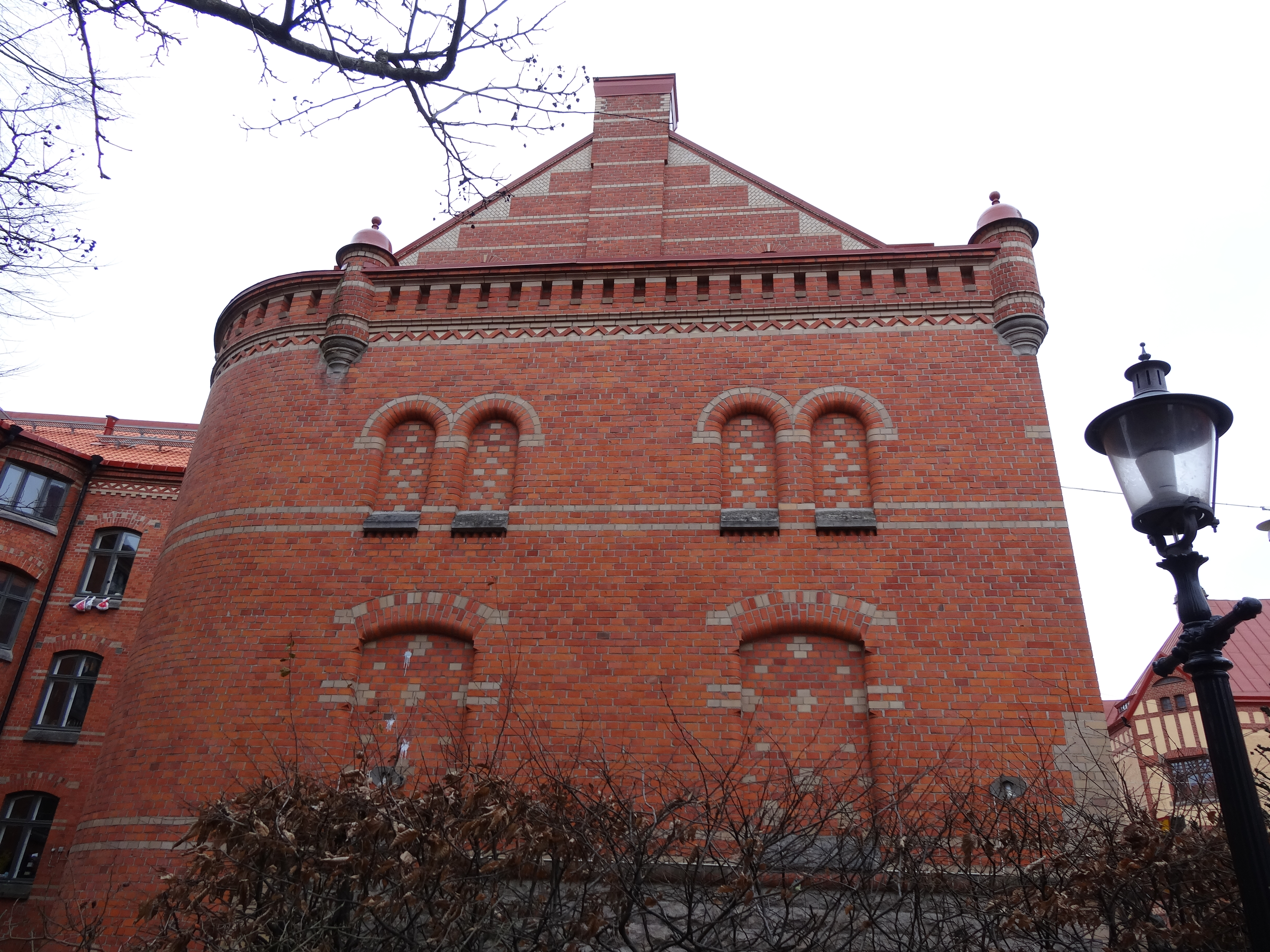 Kvarteret Majoren i Haga i Göteborg. Bostadshus vid Kaponjärgatan 2B, Kaponjärgatan 2C, Kaponjärgatan 2D.